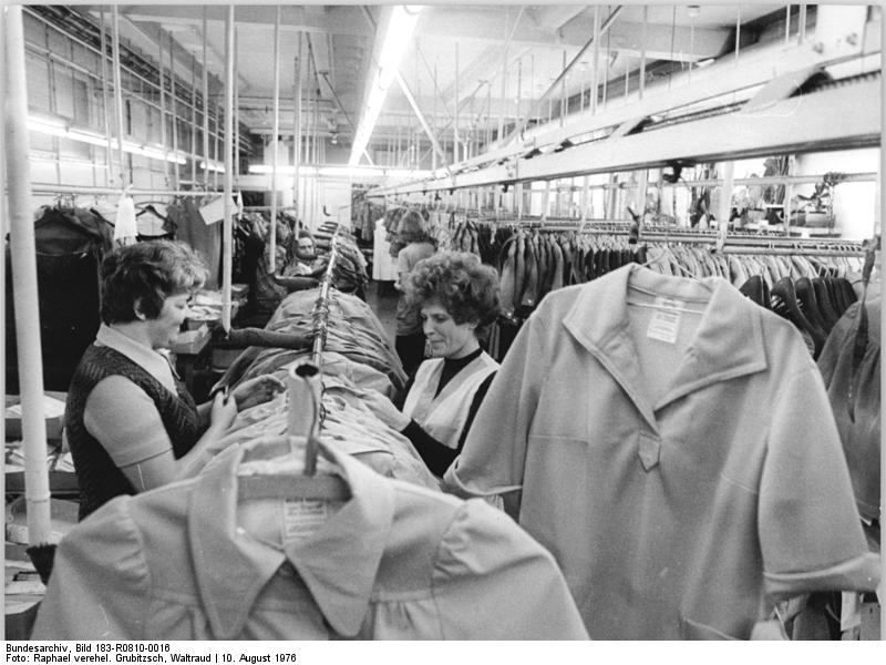 ADN-ZB-Raphael-10.8.1976-eng-Leipzig: Den Kunden höchste Qualität anzubieten - mit dieser Zielstellung kontrollieren die TKO-Mitarbeiterinnen Annelies Mittenzwei (l) und Anita Baumann (r) in der Endkontrolle des VEB Leipziger Bekleidungswerke "vestis". Ihr gestrenger Blick fällt dabei täglich auf rund 300 Erzeugnisse. Mustertreue, Verarbeitungs- und Gewebequalität werden besonders berücksichtigt.